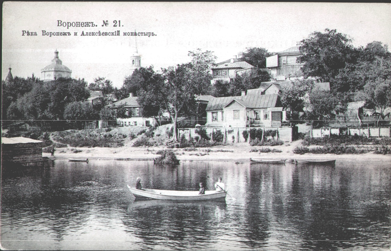 Река Воронеж и Алексеевский монастырь